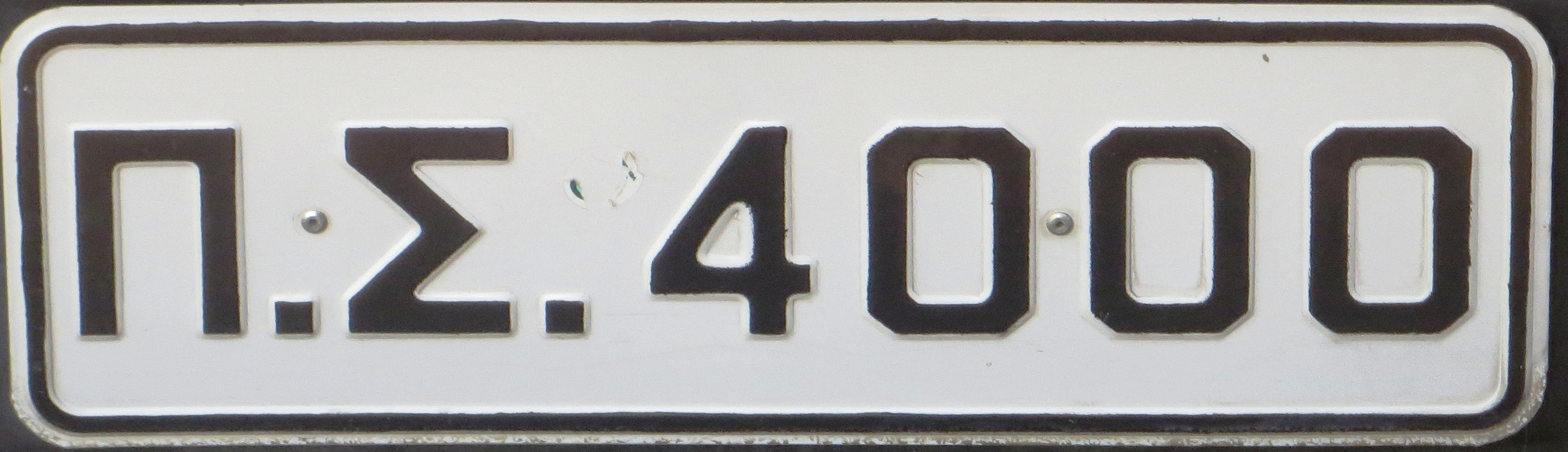 Griekse brandweer kentekenplaat